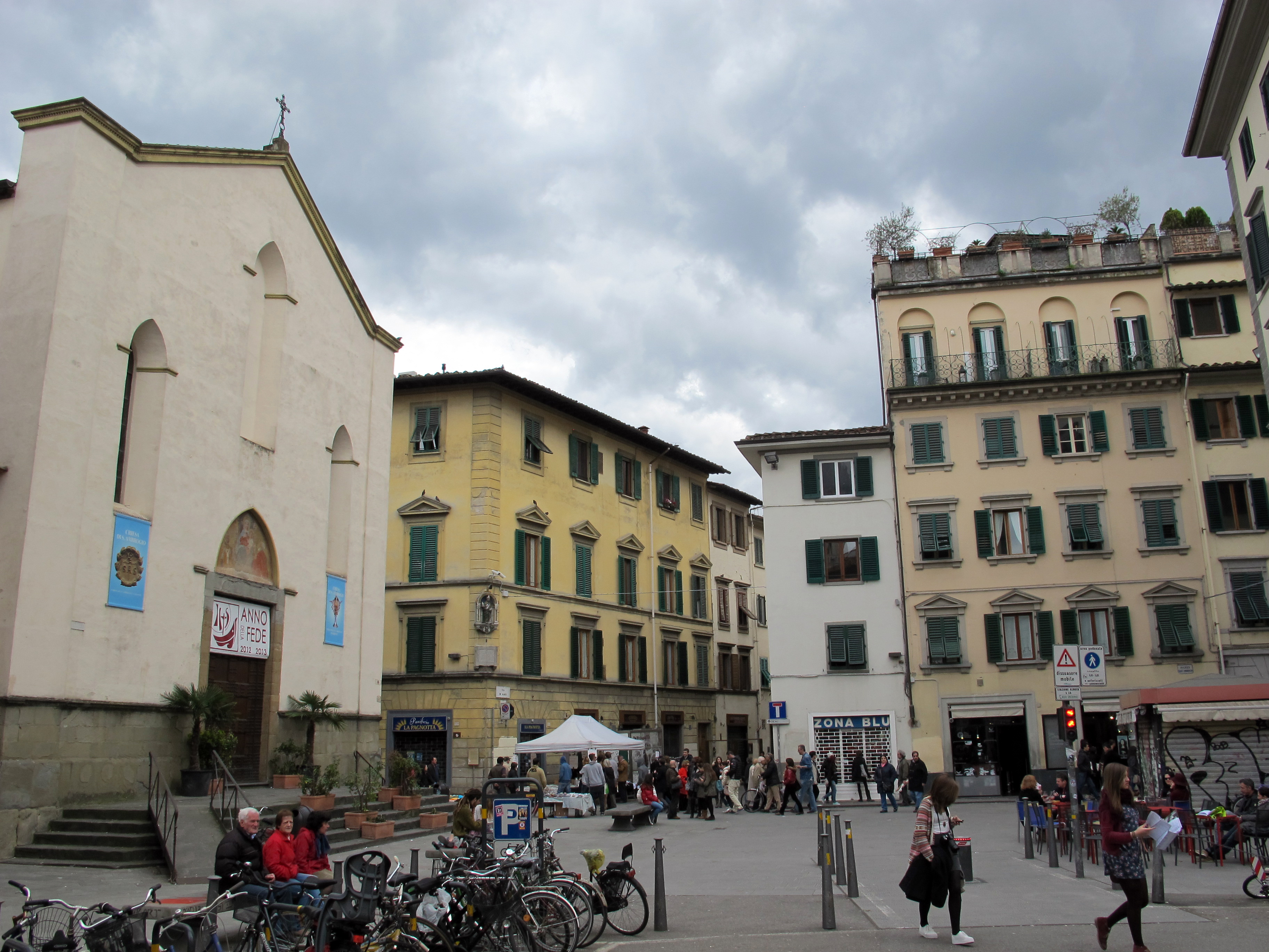 Piazza sant'ambrogio, fi